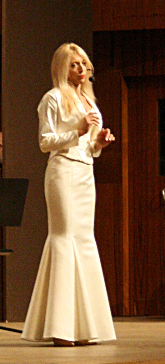 Dobrotvorni koncert "Križ nek' ti sačuva ime" u koncertnoj dvorani Vatroslav Lisinski u Zagrebu.